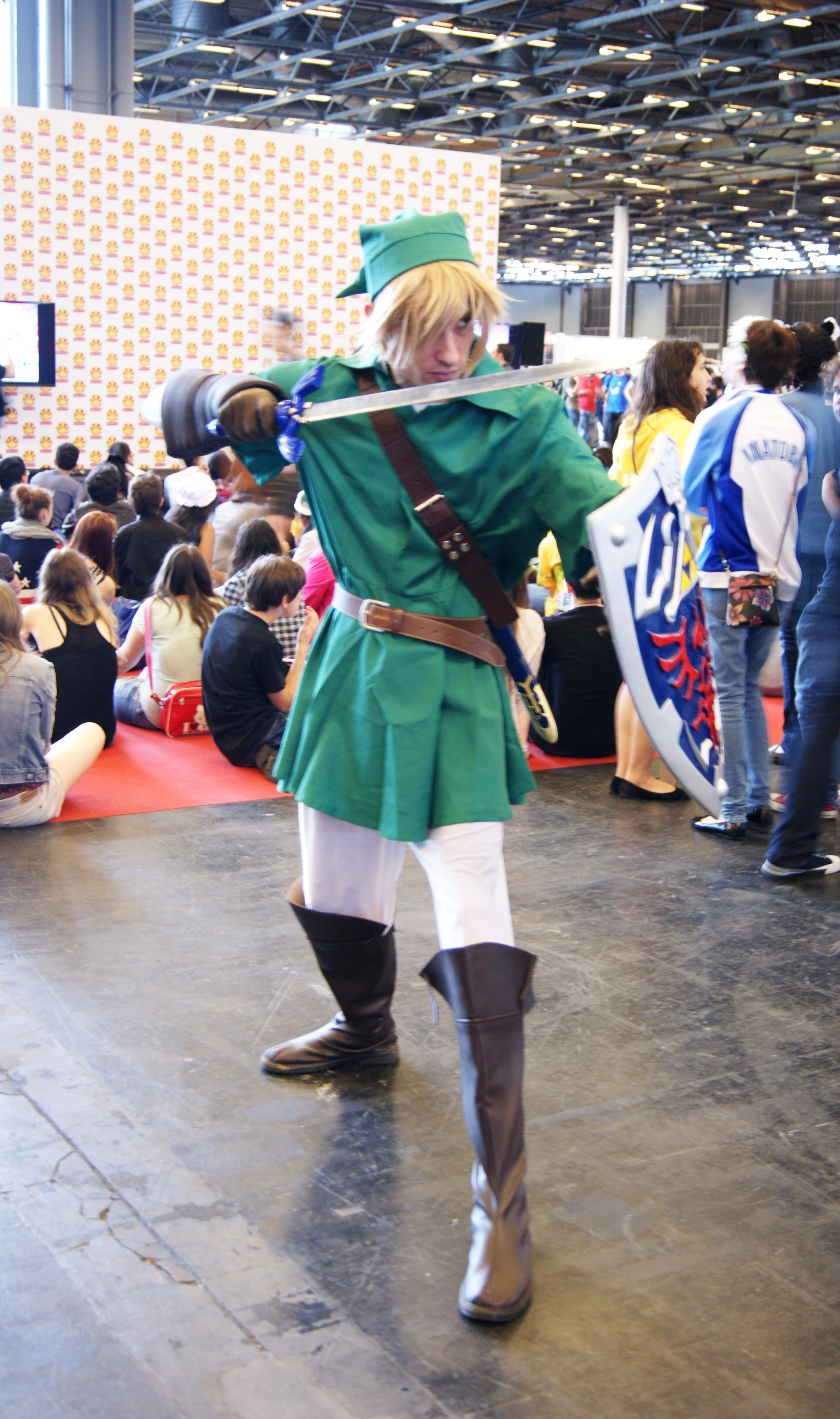 Cosplay Japan Expo 2014